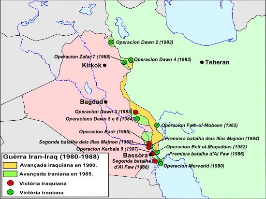 Guèrra Iran Iraq (1980-1988).